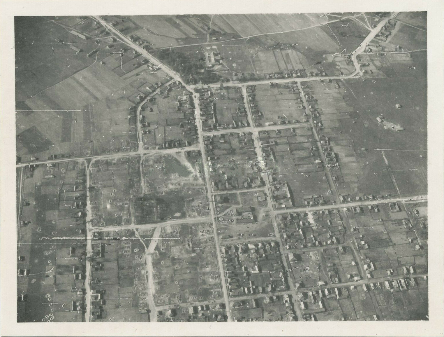 Беларуская (тарашкевіца): Шумячы (Šumiačy). Аэрафотаздымак